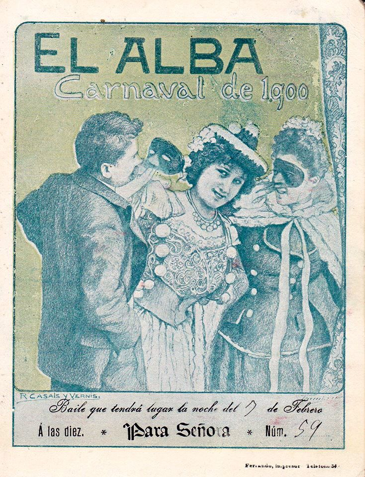 Invitació de senyora per al carnaval de El Alba el 1900